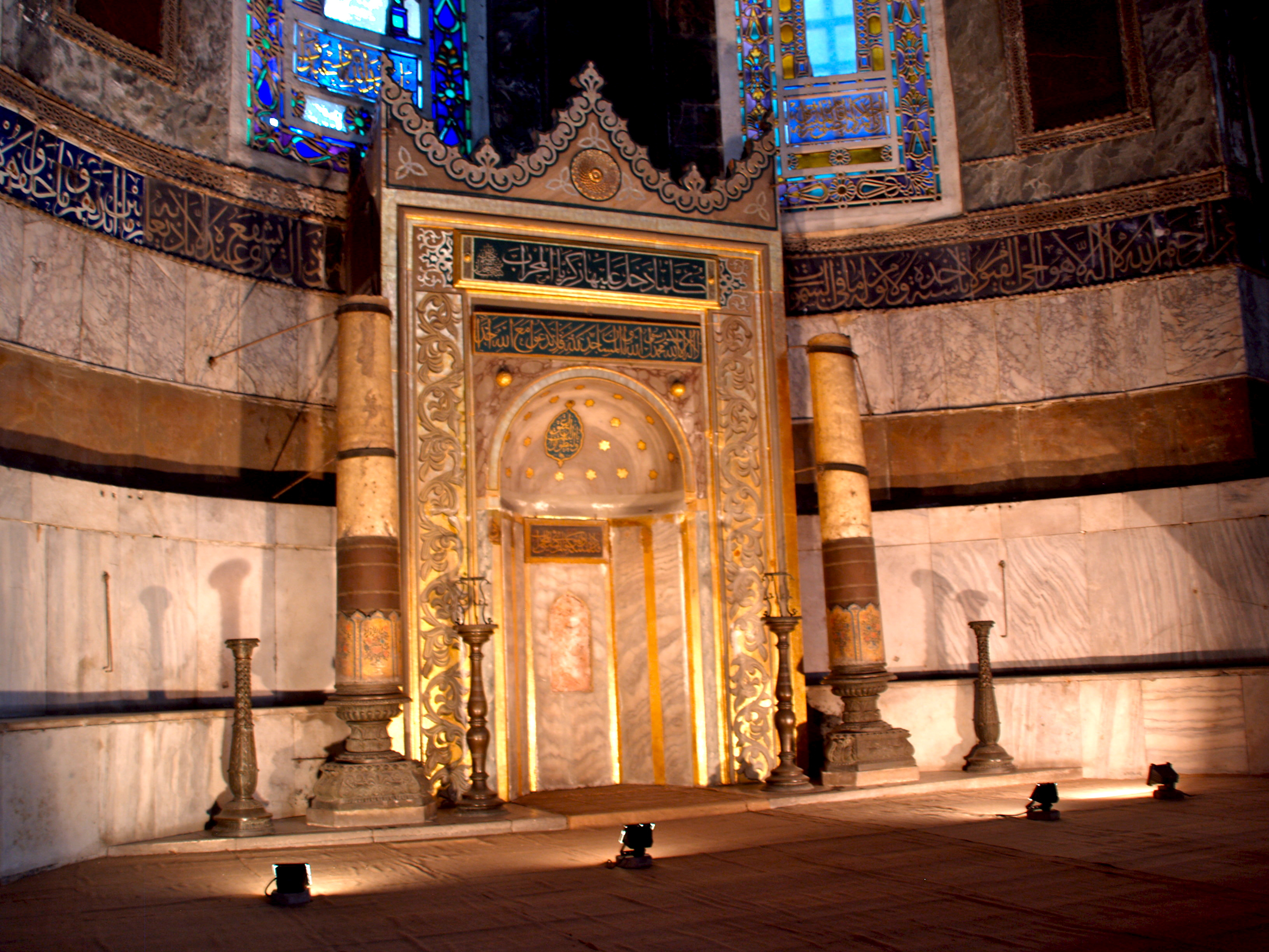 Turkey, Istanbul, Hagia Sophia (Ayasofya)